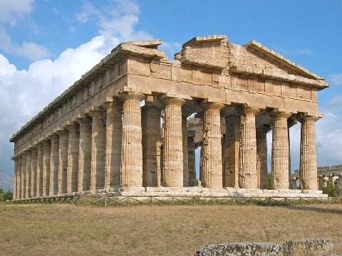 Ce temple connu sous le nom de "temple de Neptune" est le plus récent (environ 450 av. J.C.) des grands édifices de Paestum. Il est dédié à Hera, c'est un édifice dorique de grandes dimensions (25 x 60 m). Il comprend une colonnade de 6 x 14 colonnes. voir aussi